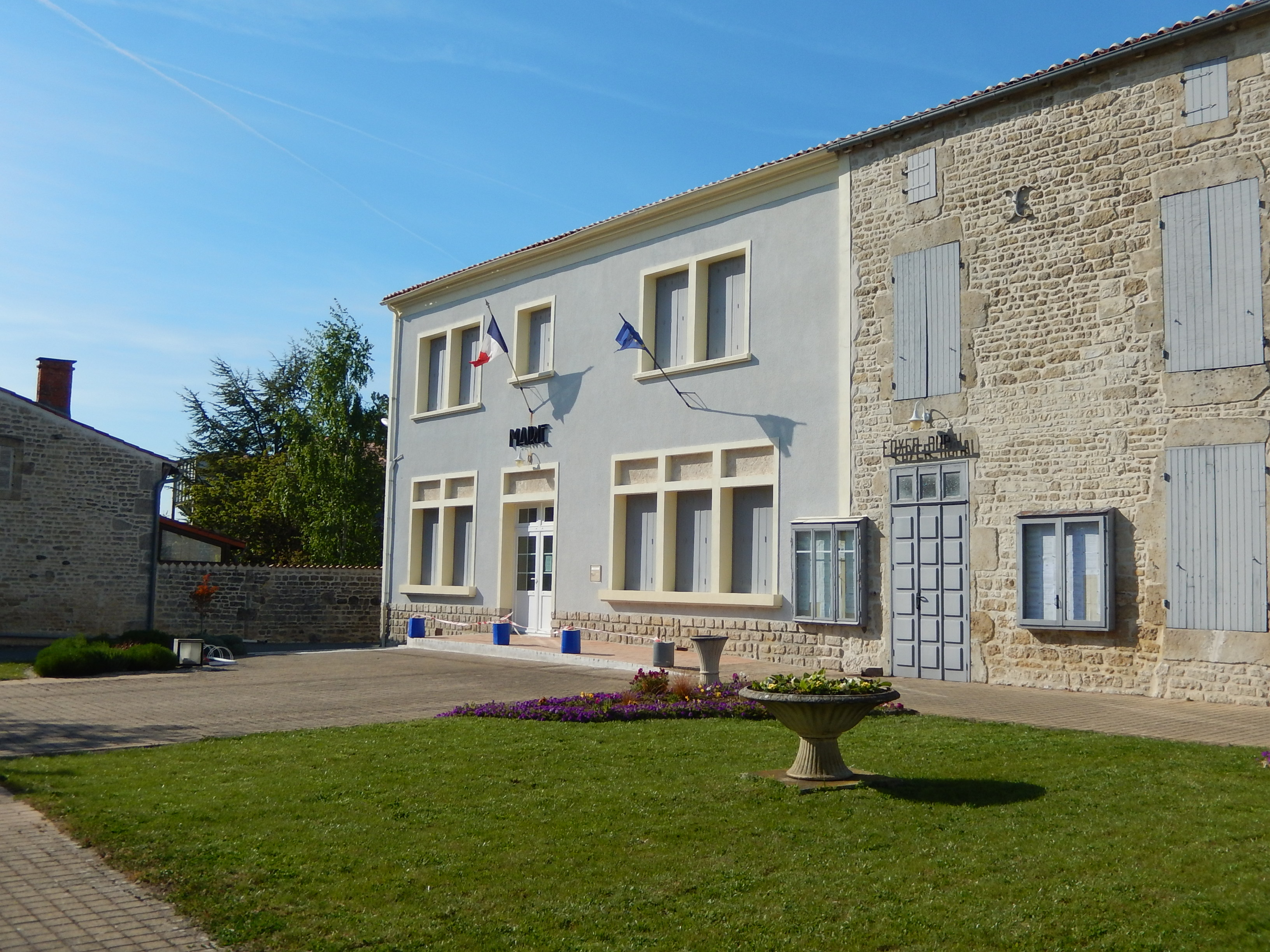 La mairie de Coivert (Charente-Maritime, France).